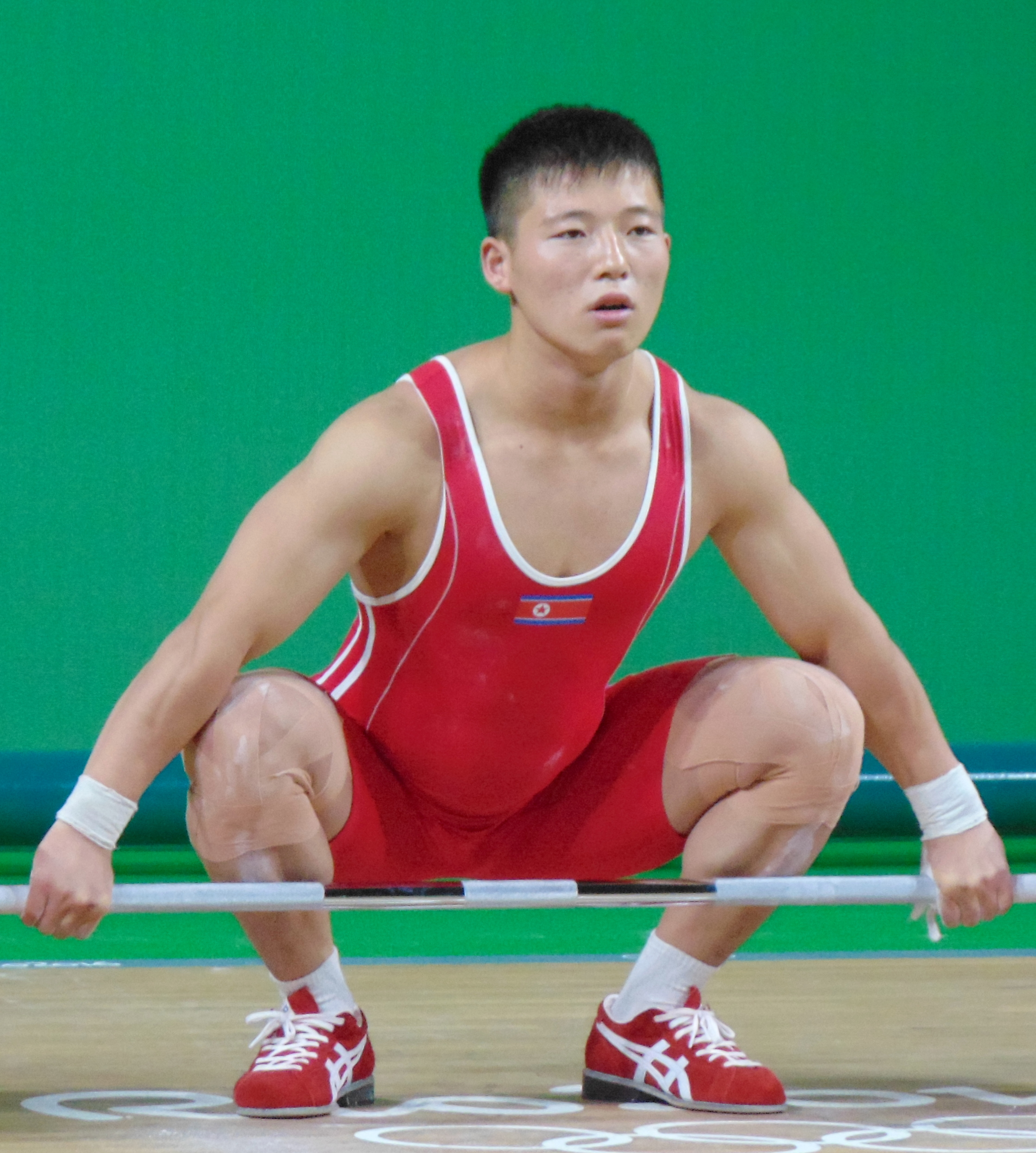 Rio 2016 - Weightlifting men's 69 kg